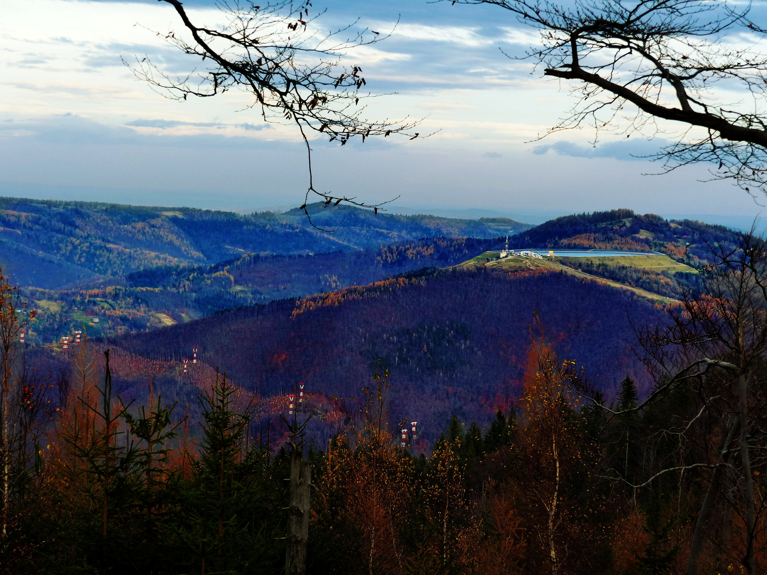 Widok na Górę Żar z okolic wierzchołka Czupla, kilkadziesiąt metrów od wierzchołka w kierunku Międzybrodzia Bialskiego.